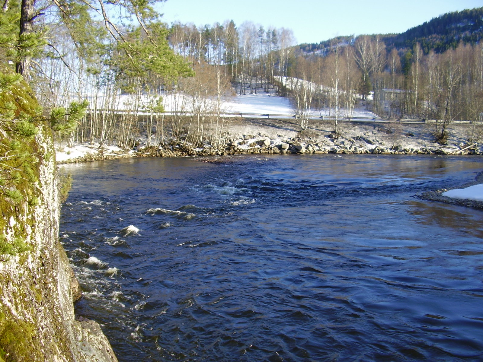 Bøelva i Bø, Telemark.